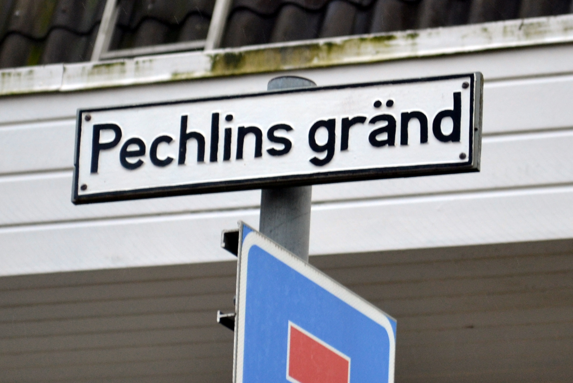 Gatuskylt, Pechlins gränd, Varberg.